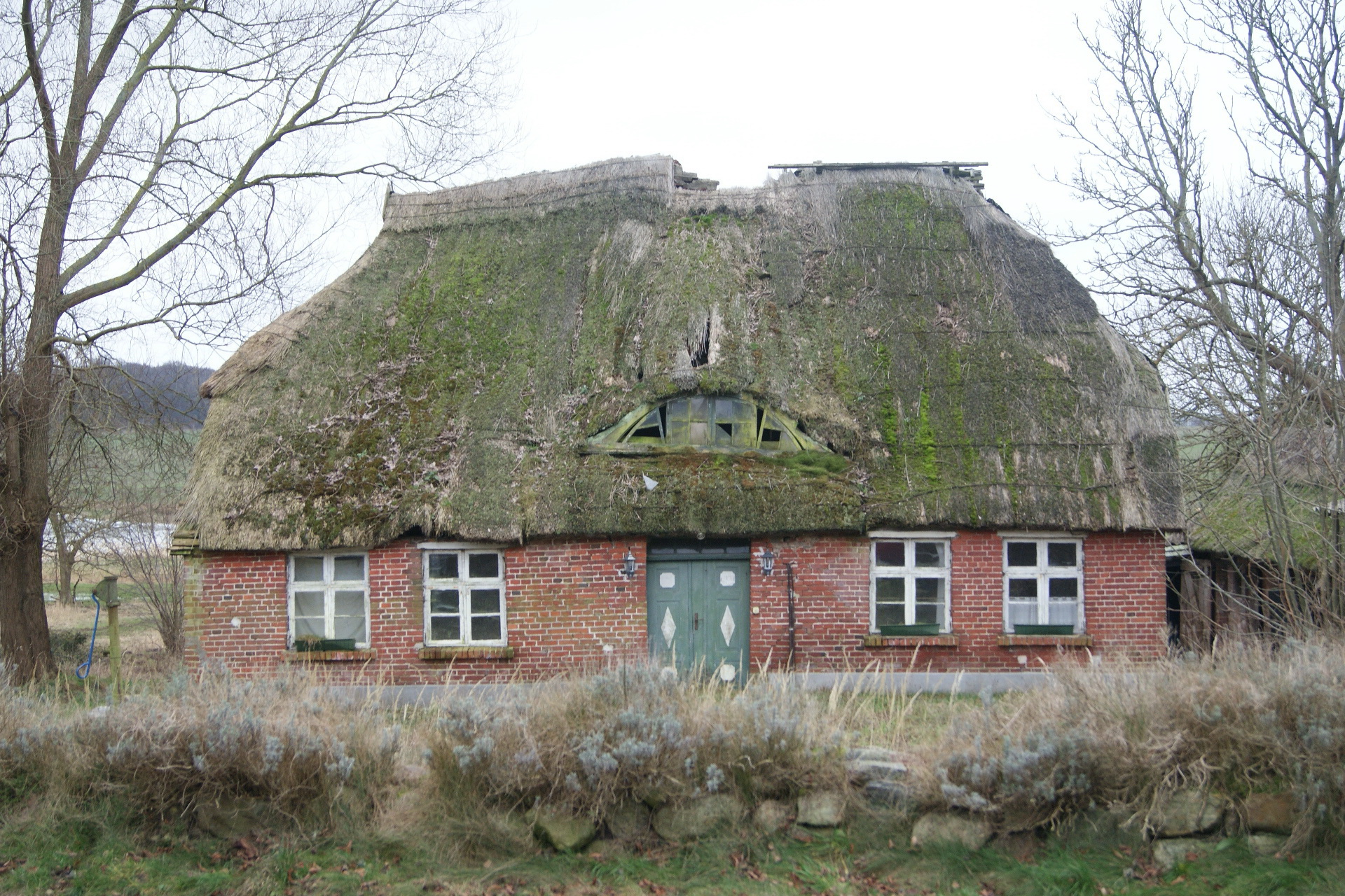 Vilmnitz, Landkreis Vorpommern-Rügen. Dorfstraße 22, Bauernhaus.